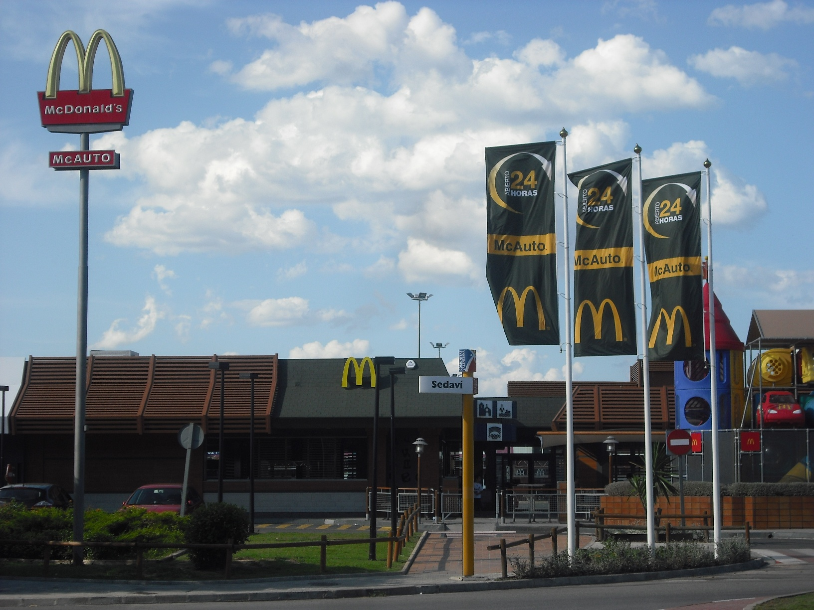 Entrada a Sedaví i McDonald's.